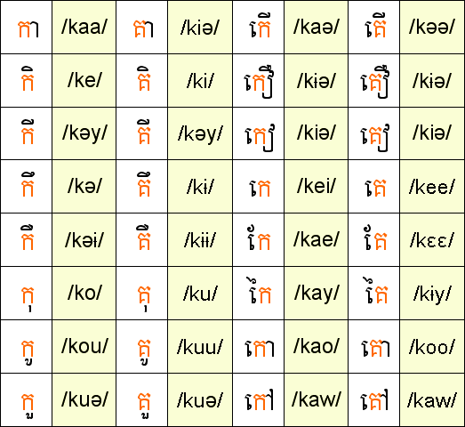 vowel symbols in Khmer script